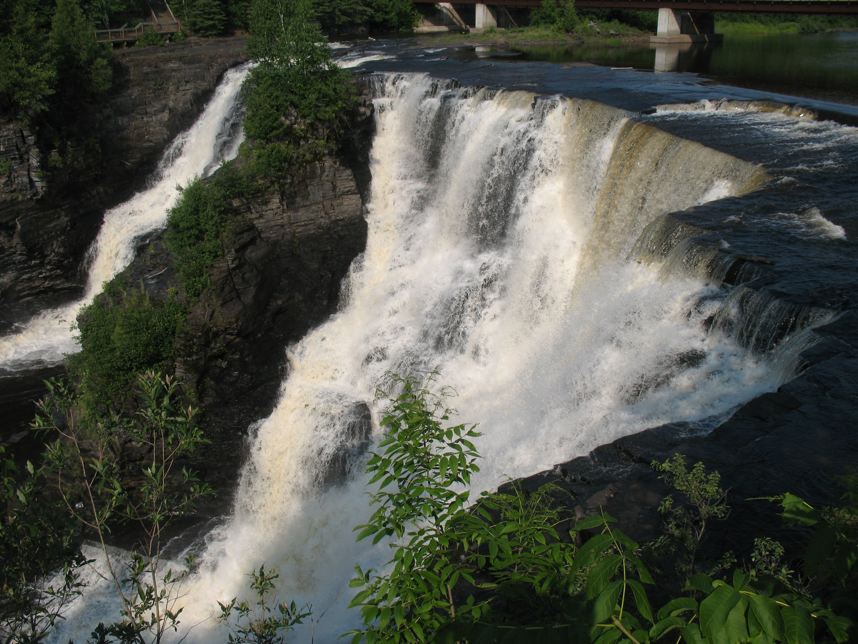 Kakabeka Falls, Nord-Ontario